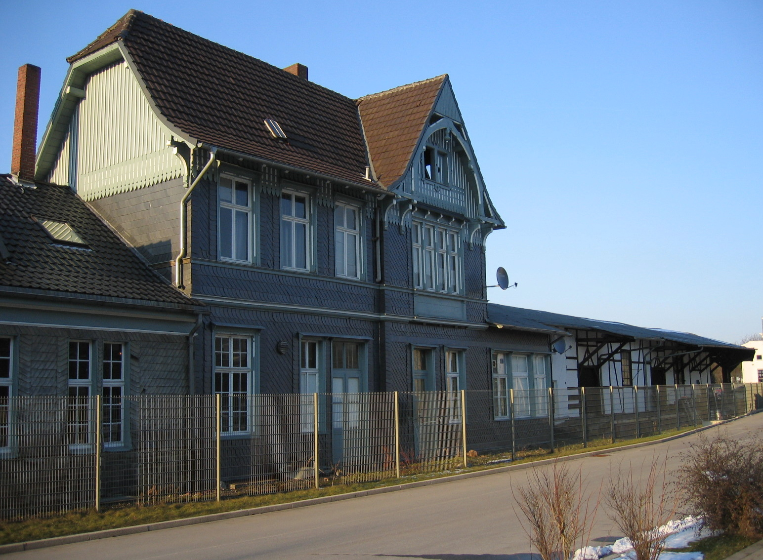 Description: Rückansicht (Bahnsteigseite) des ehemaligen Bahnhofs Westig in Hemer. Technisches Denkmal seit 1984. Fachwerkgebäude im Landhausstil mit Bruchsteinsockel. Source: selbst fotografiert Date: 13. März 2006 Author: Asio otus